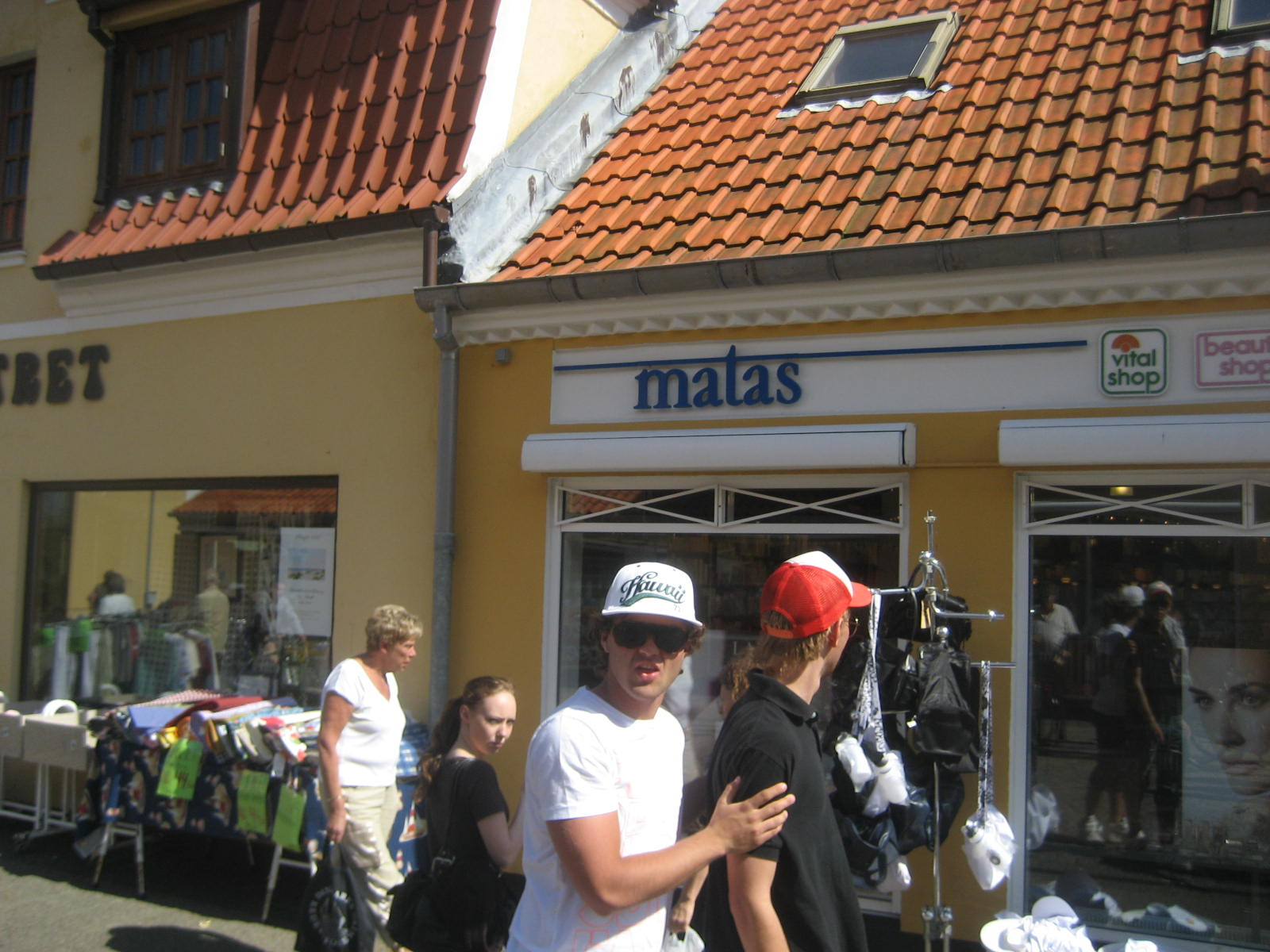 Matas-butik i Skagen